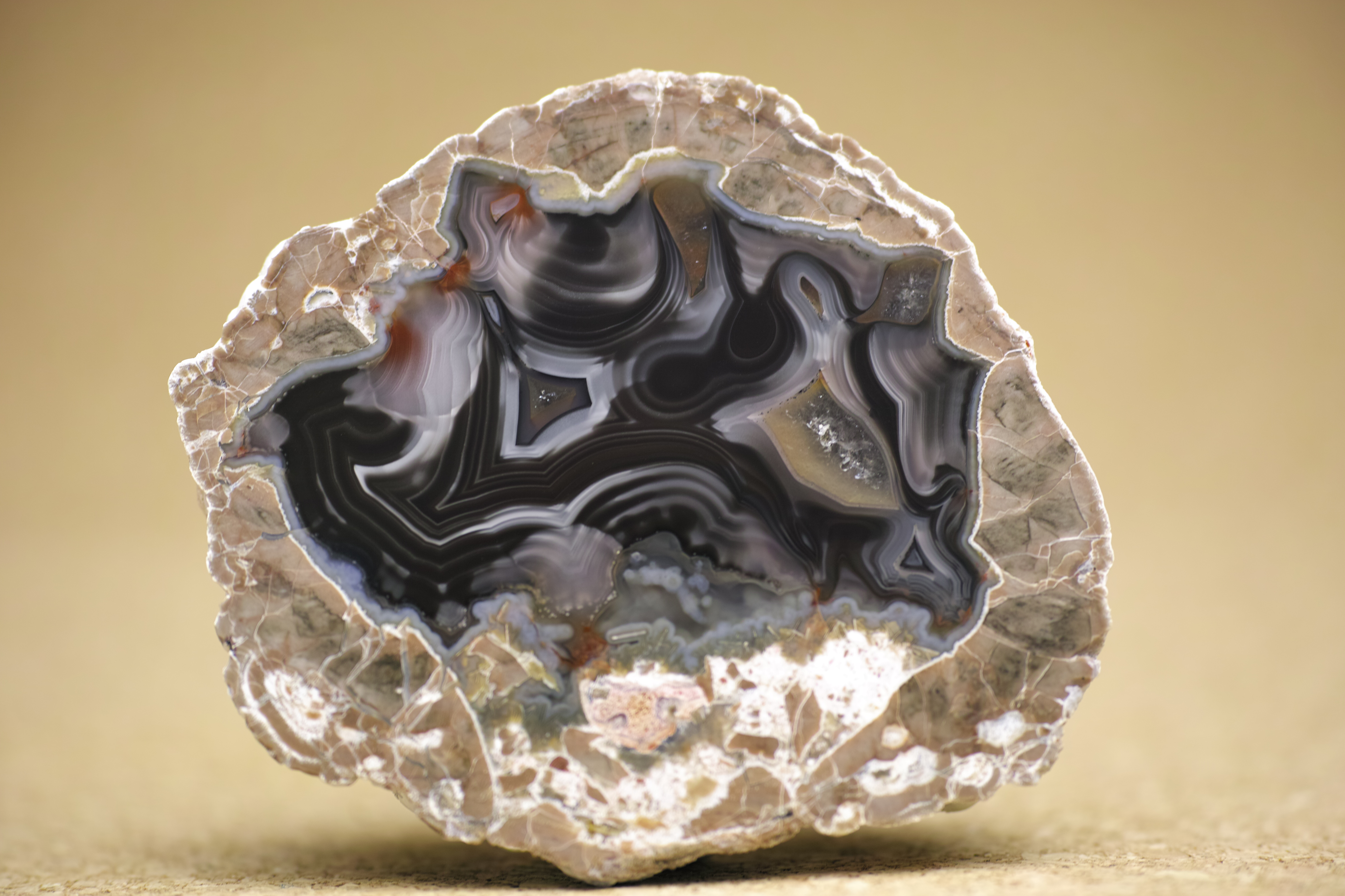 Baker mine thunderegg from Baker Ranch, near Deming, southwest of New Mexico, U.S.A.